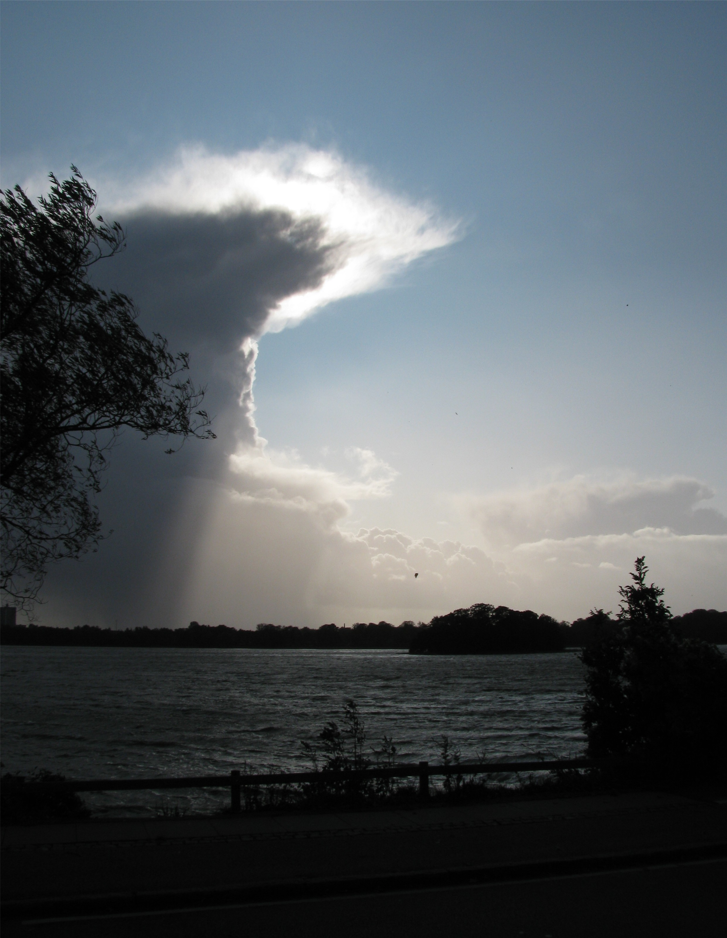 Bagsværd Sø, view to Gaaseholm from Baadfarten